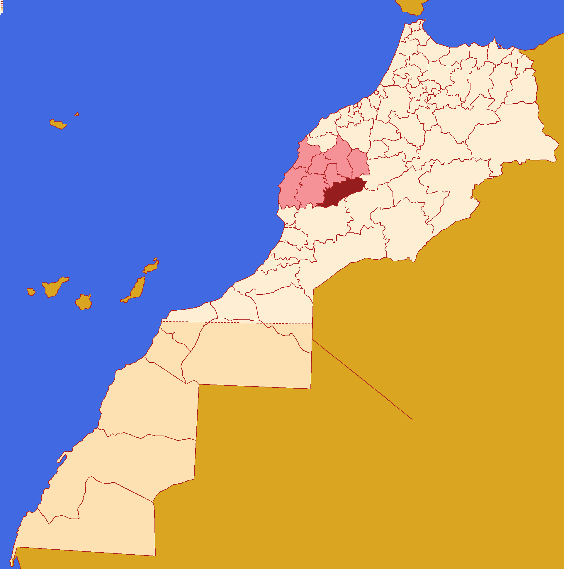 Localização da província de Al Haouz ,dentro da região de Marraquexe-Safim e dentro de Marrocos. Conforme a reforma administrativa de 2015.